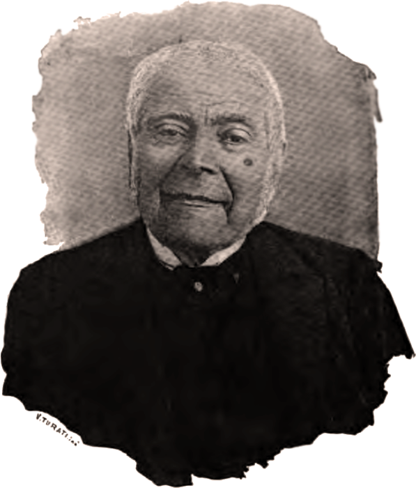 Ritratto di Bartolommeo Capasso.